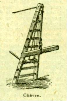 Image d'une chèvre de levage au début du XXième siècle